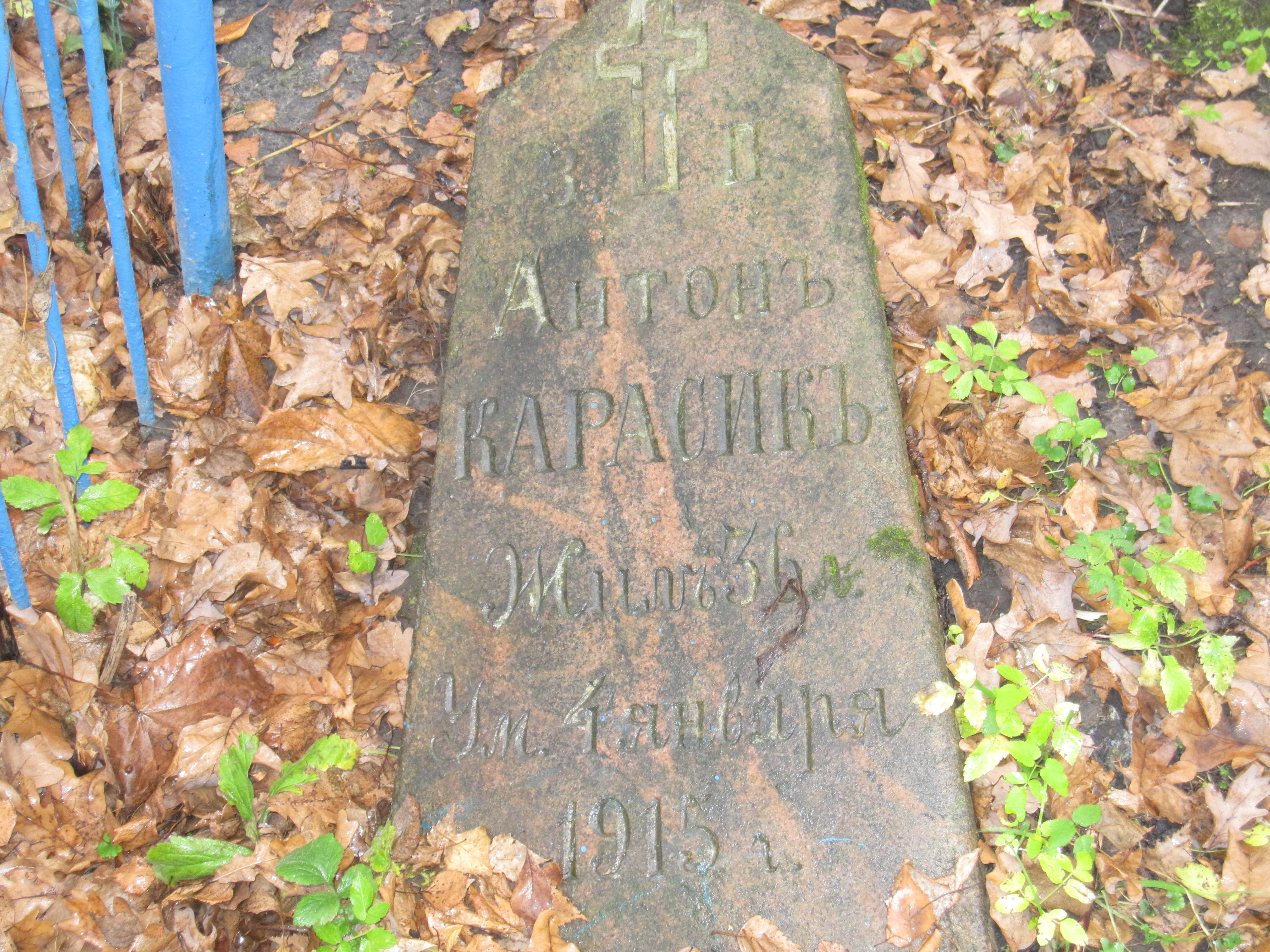 Надмагільны камень 1915 года з надпісам па-руску ў дарэвалюцыйнай арфаграфіі. Могілкі "Пятроўшчына". Мінск.